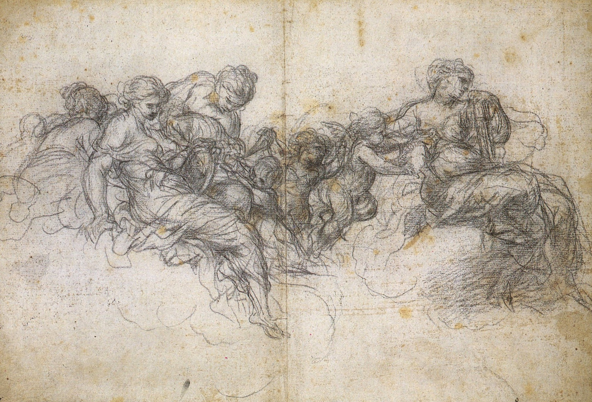 Pietro da Cortona studie till plafond i Palazzo Pitti i Florenz, svartkrita